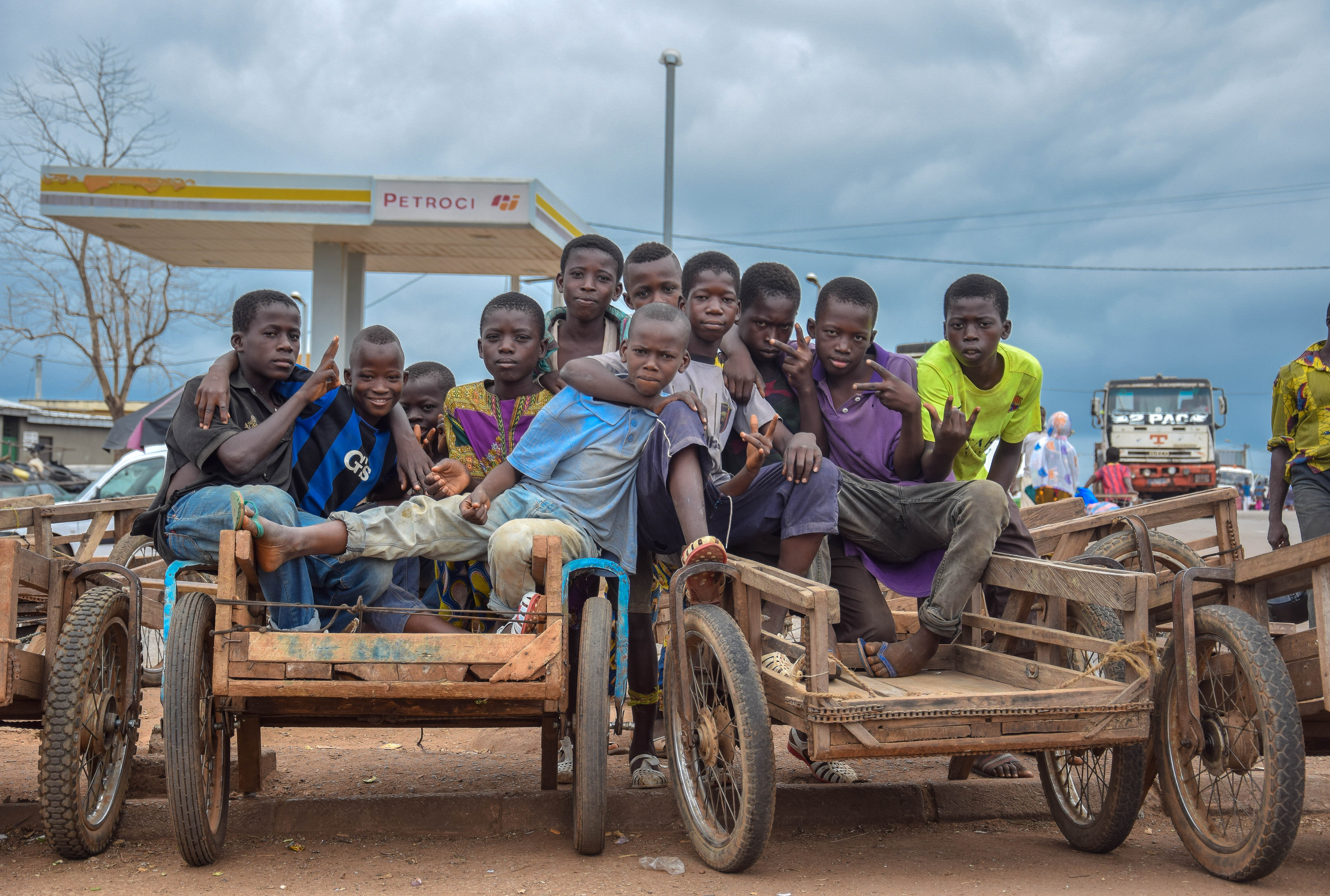 Enfants jouant à la gare routière pose dans des charrettes qui transportent des bagages This is an image with the theme "Africa on the Move or Transport" from: Ivory Coast